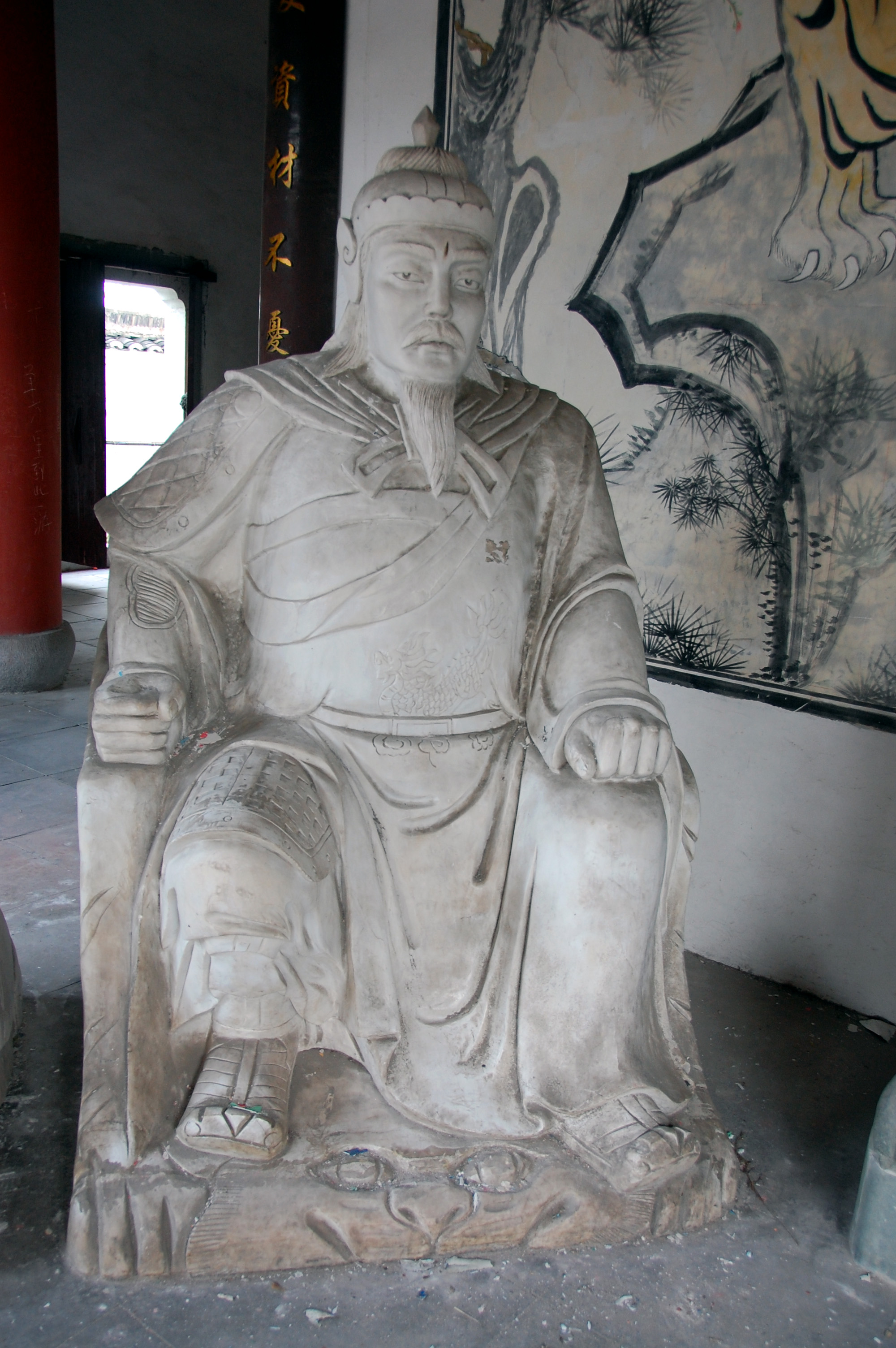 清明上河図/清明上河图